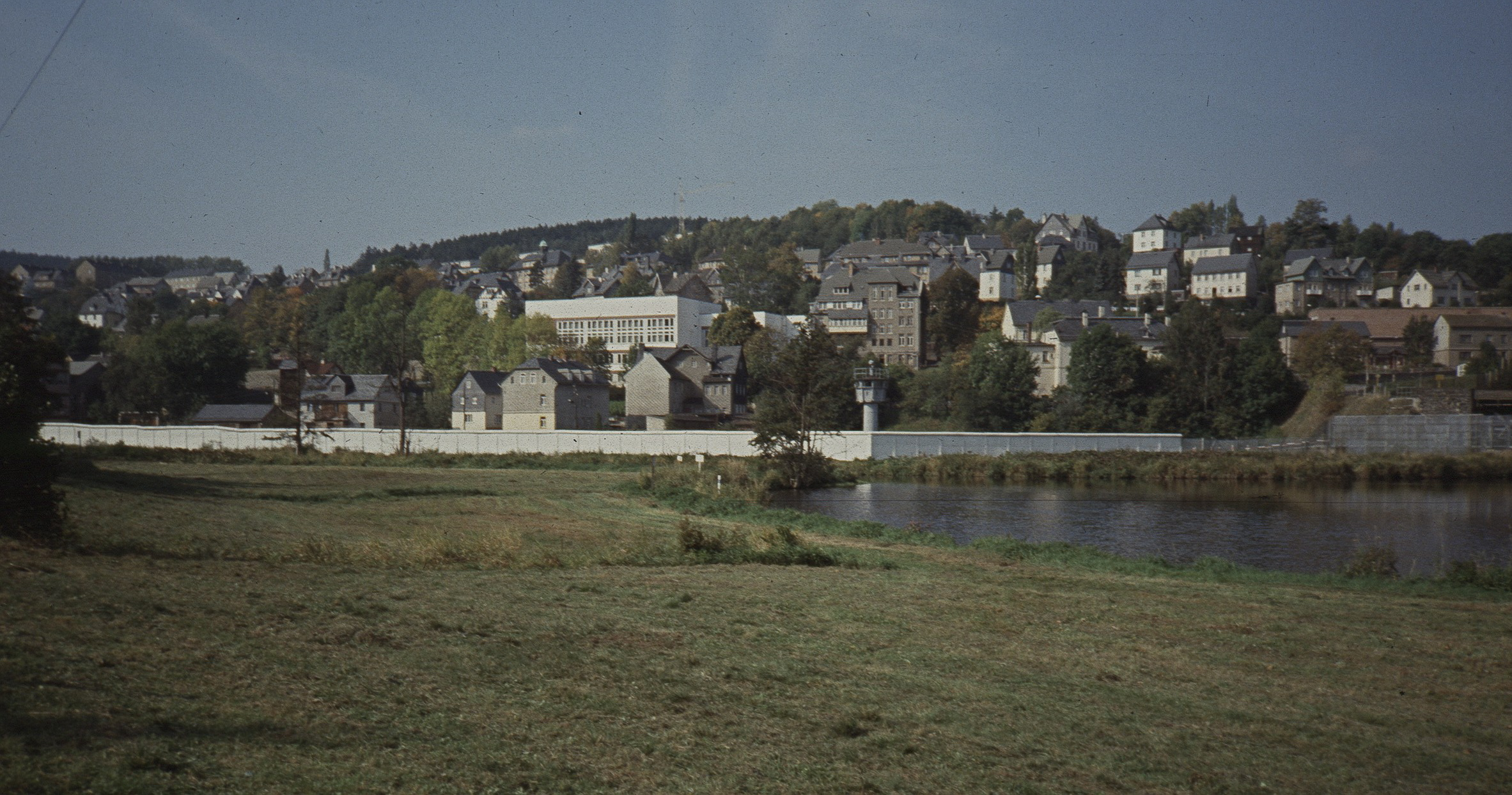 Blankenstein (Thüringen) mit Grenzanlagen, der Fotograf stand in Bayern, die abgebildeten Gebäude befanden sich im Bezirk Gera, DDR